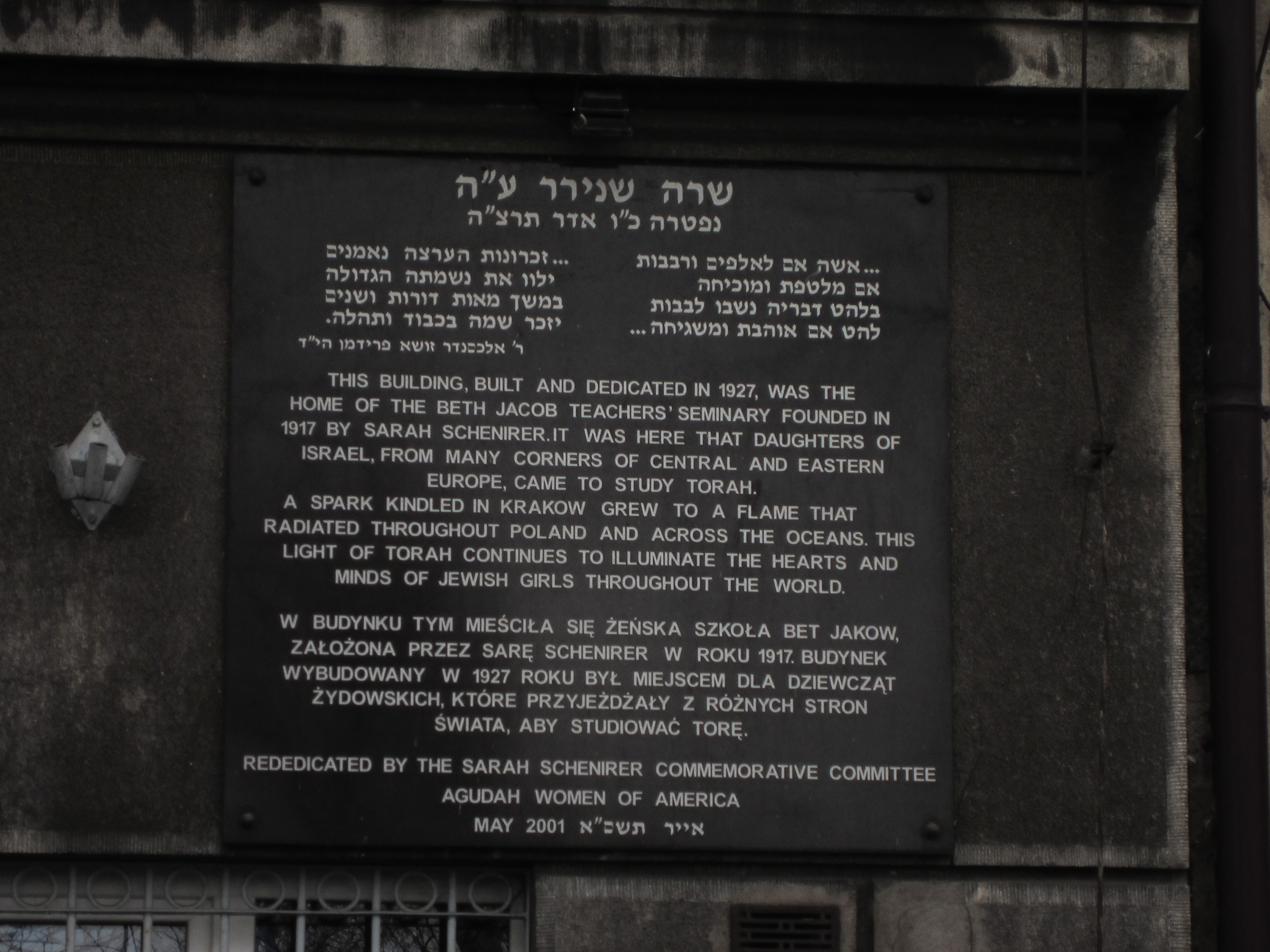 הנצחה לשרה שנירר על קיר בית הספר הראשון של "בית יעקב", קרקוב.jpg